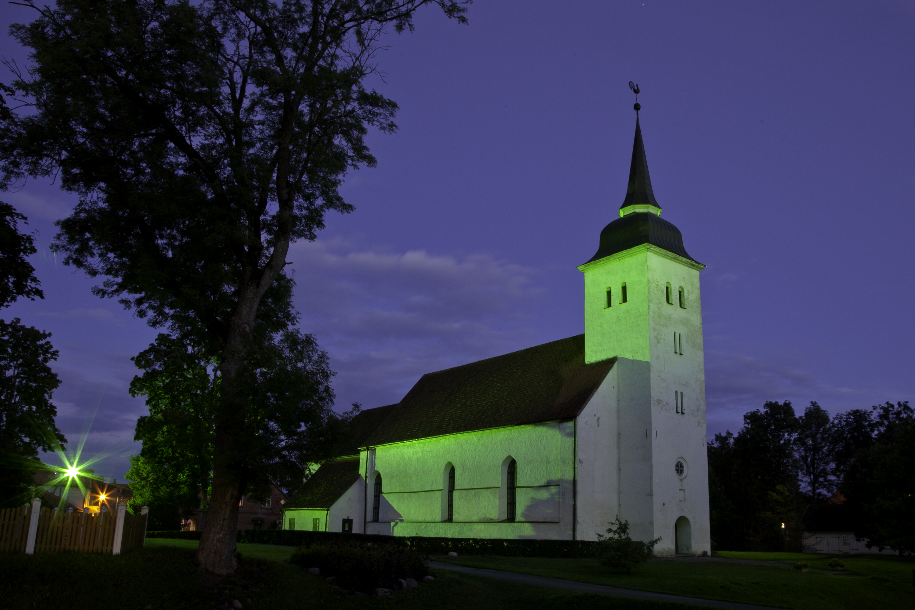 Viljandi Jaani kirik, vana frantsiskaanlaste kloostrikirik. Ehitatud aastatel 1466- 1472. Frantsisklased asutasid Viljandis ka kooli aastal 1500. Frantsisklaste kloostri tegevuse lõpetas Viljandi komtuur Wilhelm von Fürstenberg aastal 1560 .Suvel 1560 saabusid Viljandi alla Vene väed ja. pärast pikemat piiramist vallutati nii linn kui ka ordulinnus. Põles maha linna turuplatsi ääres asunud Pühale Johannese ja Pühale Clarale pühitsetud kolmelööviline kihelkonnakirik. Aastal 1582 Jam Zapolski vaherahu põhjal lahkusid venelased Viljandist ja linn läks katoliiklastest poolakate kätte, kes hakkasid taastama linna ja kihelkonna usuelu. Aastatel 1600-1624 oli Viljandi Poola-Rootsi vaheliste sõdade keerises ning lahingud muutsid linna ja linnuse rusuhunnikuks. Võitsid rootslased. Alustati endise kloostrikiriku taastamist Viljandi kihelkonna protestantlikule kogudusele. Taas sai Jaani kirik kannatada Põhjasõjas. Eestimaa läks Vene riigi koosseisu aastal 1710. Uuesti algas kiriku taastamine ning 18. sajandil II poolel sai kirik kõrge, vahegaleriiga barokse tornikiivri. Kirik põles aastal 1811. Siis ehitati praegune hilisbarokne tornikiiver aastal 1815. Sellisena on kirik säilinud tänase päevani. Aga Jaani kirik jäi linna- ja maakogudusele kitsaks ja kavandati ehitada uus kirik. Viljandi kihelkonna maakogudusele ehitati Pauluse kirik aastatel 1863-66. 1952. aastal suleti kirik nõukogude võimu poolt. Restaureeriti 1980-ndatel aastatel kui kontsertsaali. Jaani kirik taaspühitseti 1992.